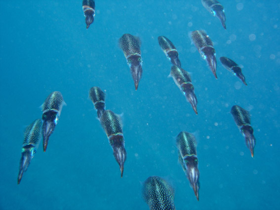 Banc de Sepioteuthis lessoniana (Ile de la Réunion) (Photo personnelle)